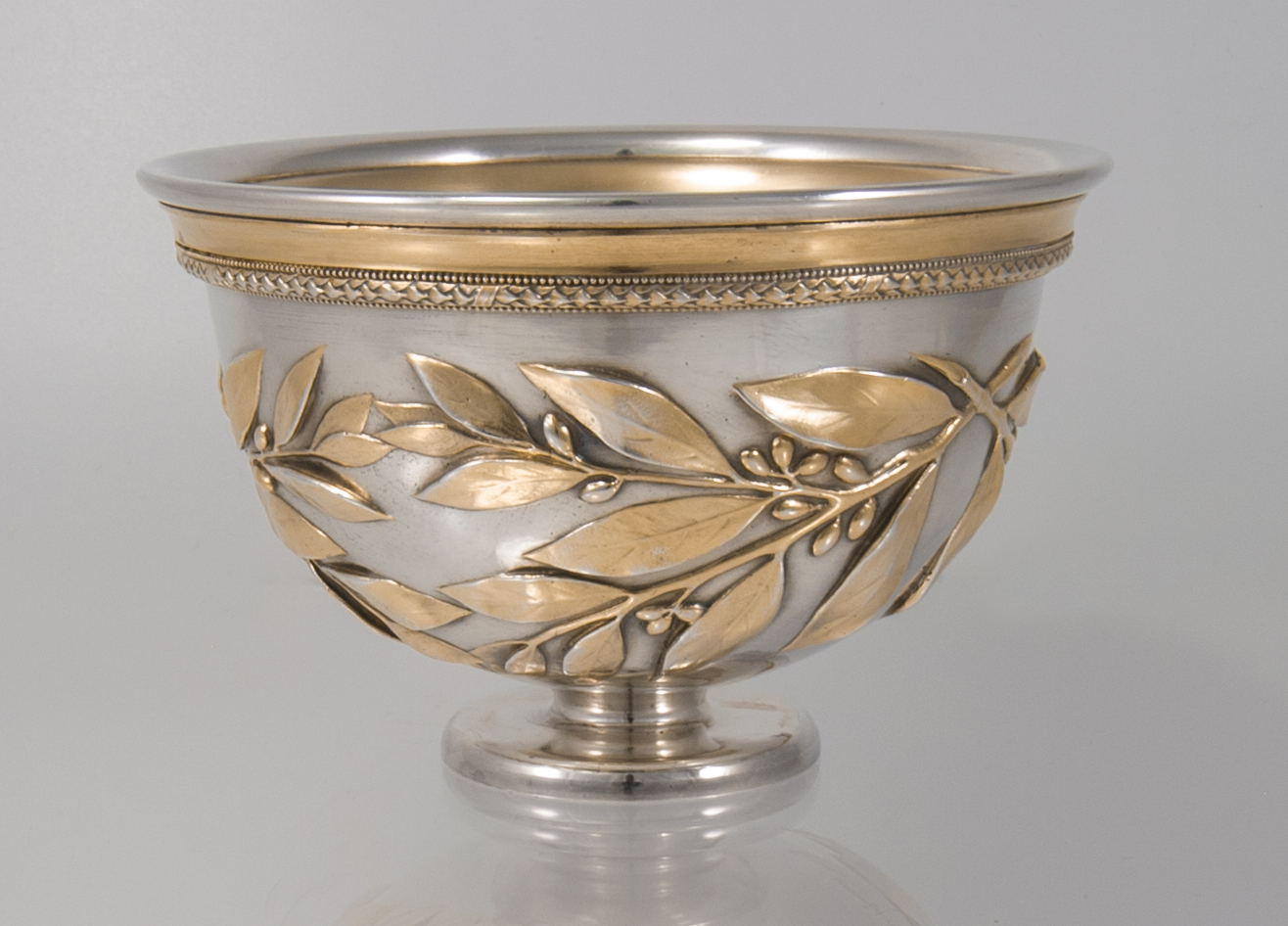 Lorbeerschale, 925er Silber mit Ziervergoldung. Nachbildung von römischem Tafelsilber , 1.Jh. n.Chr. aus dem Hildesheimer Silberfund. Original im Antiken-Museum, Berlin. Nachbildung im Stadt-Museum, Hildesheim. Produzent: Gold- und Silberschmiede Th. Blume, Hildesheim. Höhe: 10,5 cm, Durchmesser: 16 cm